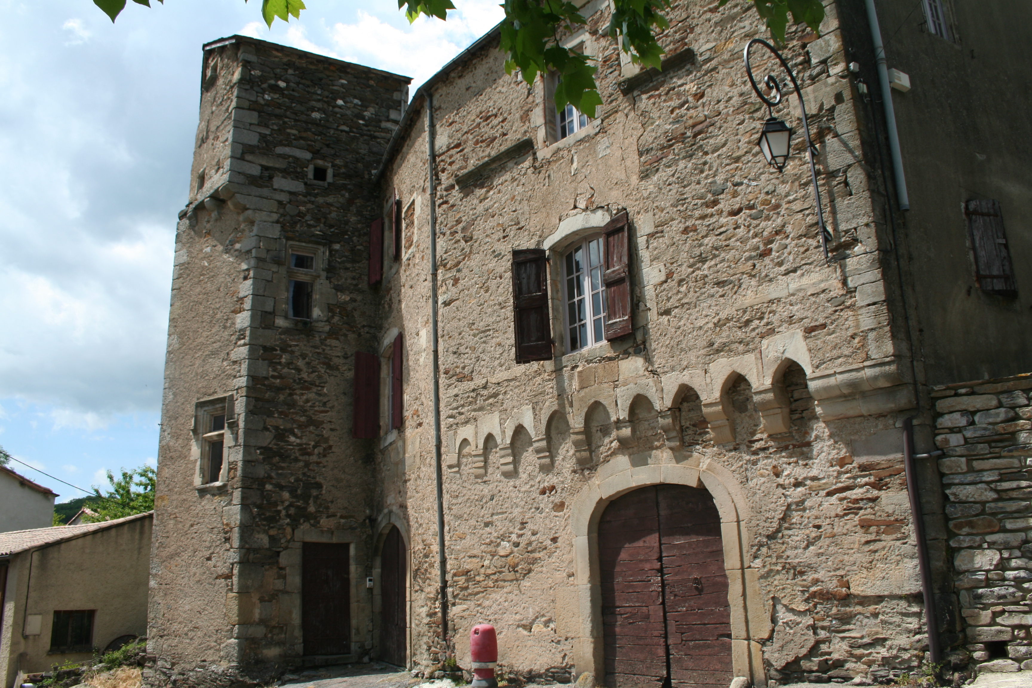 Fayet (Aveyron) - château de Laroque.